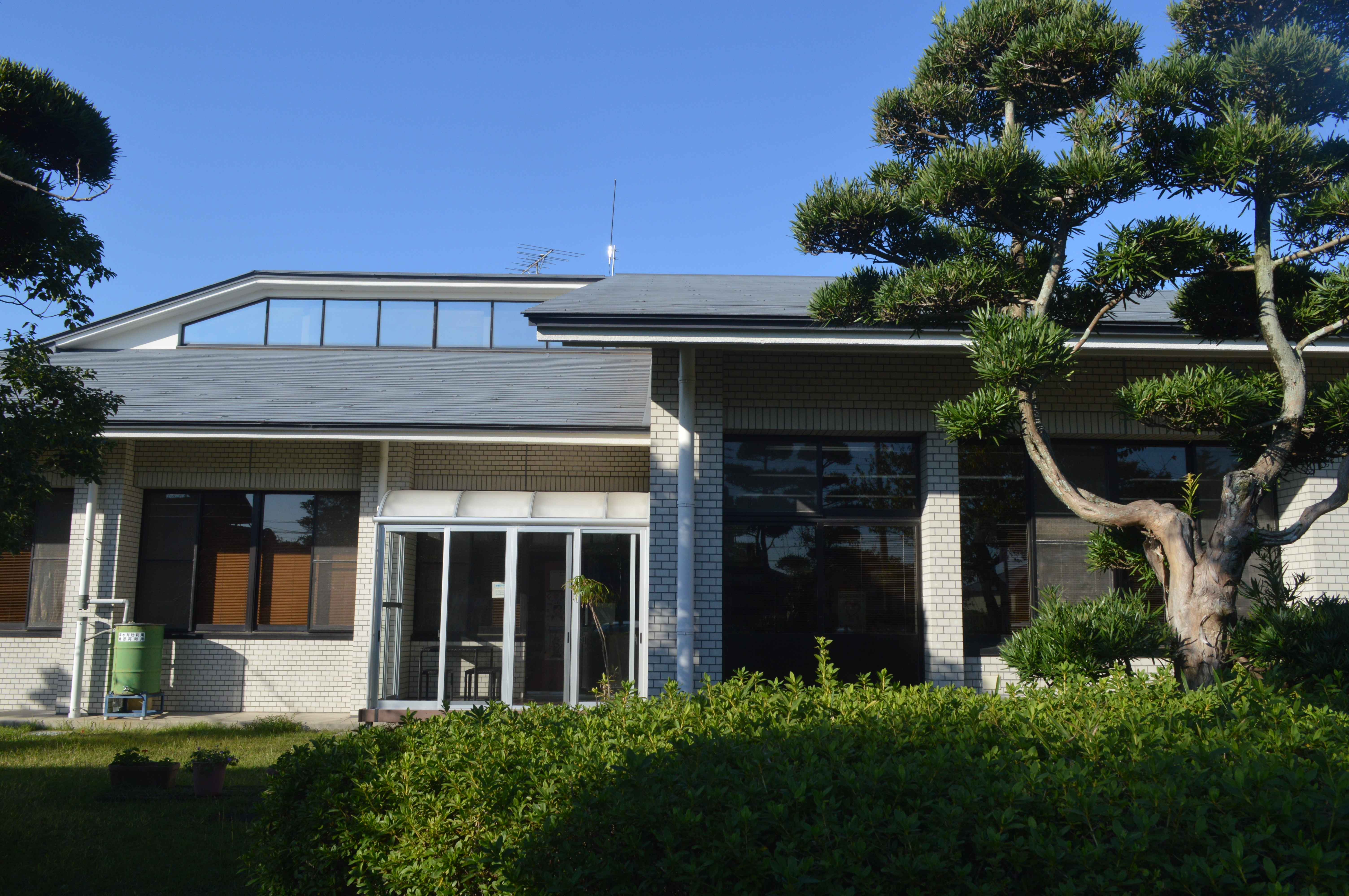 愛知県西尾市の西尾市立吉良図書館。